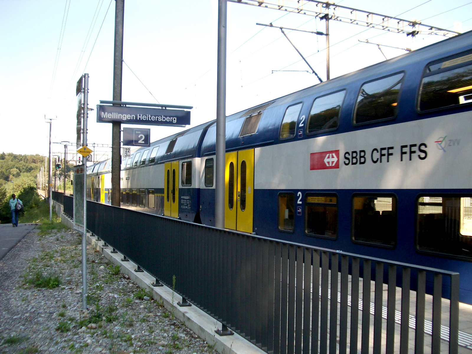 Mellingen AG, Switzerland self-made, 2006-08